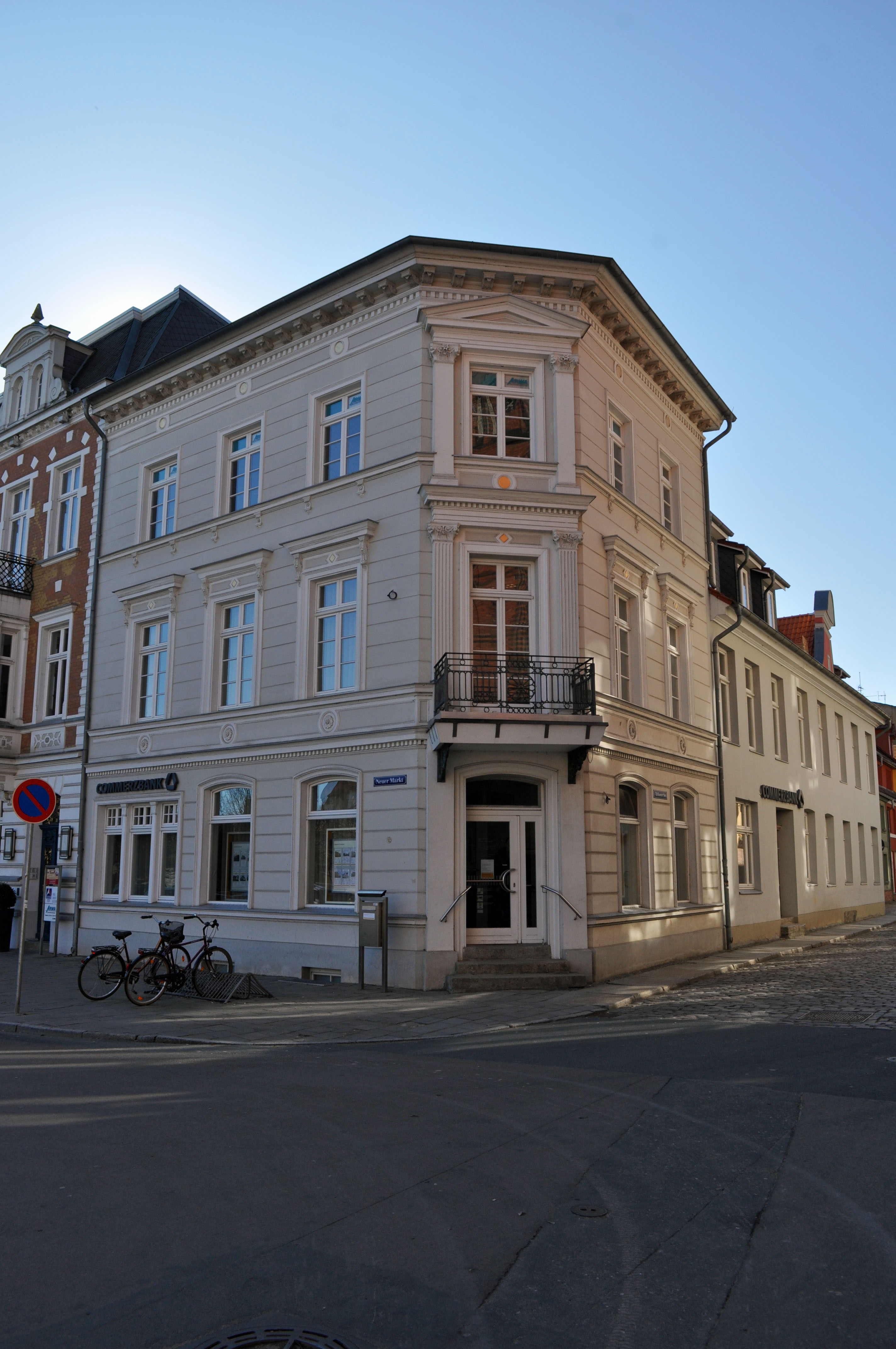 Gebäude bzw. Gebäudedetail in Stralsund. Straße und Hausnummer siehe Dateiname. Das Gebäude ist als Baudenkmal ausgewiesen, siehe dazu die Liste der Baudenkmale in Stralsund.